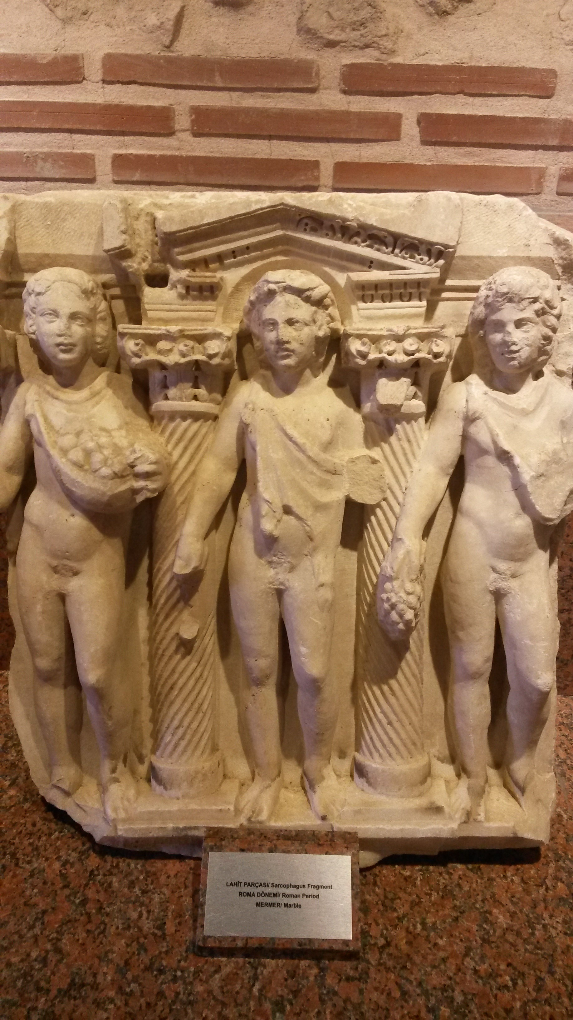 Tokat müzesinde sergilenmketedir.